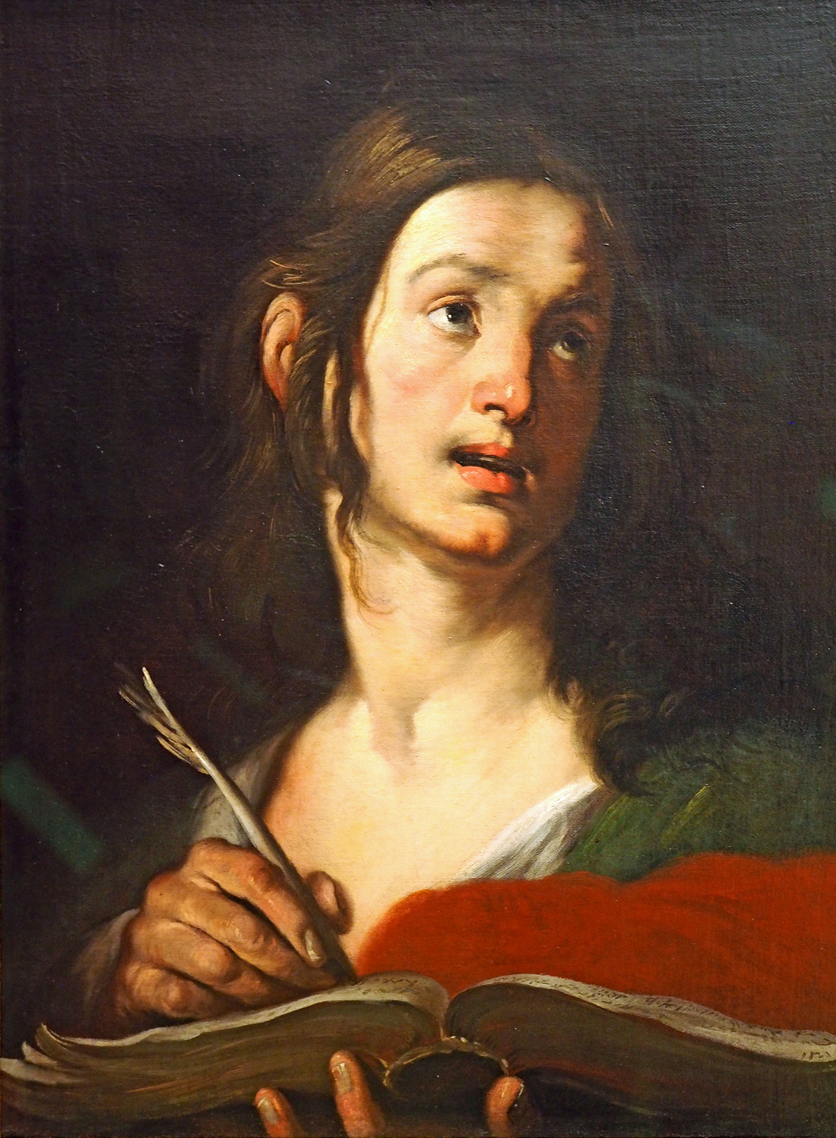 Im Louvre befindest sich eine Vorzeichnung diese Bildes, datiert gegen 1625.